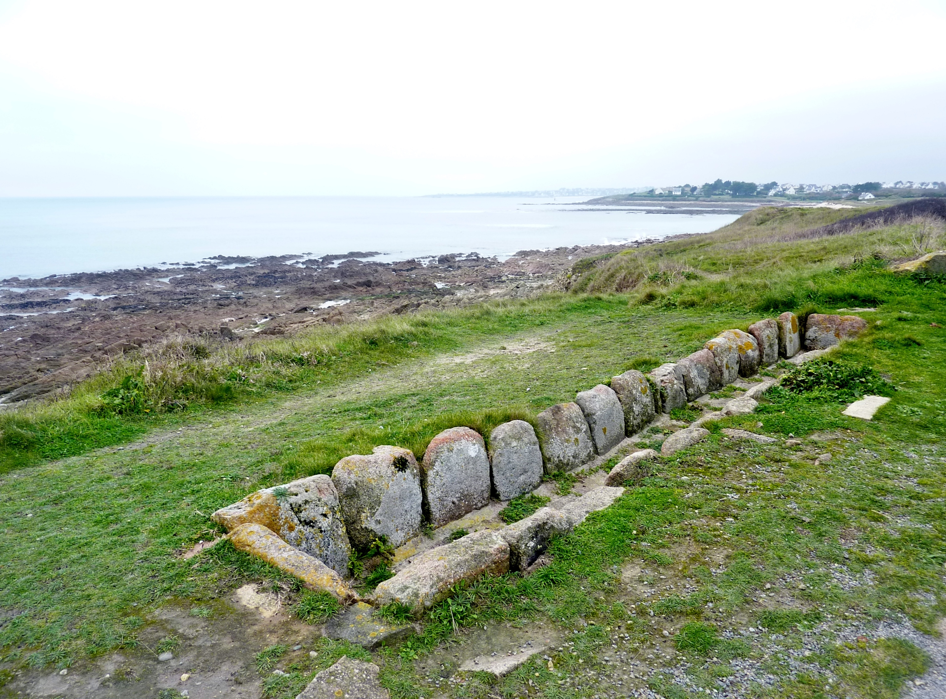 Plouhinec (Finistère) : four à goémon près de la pointe de Karreg Léon